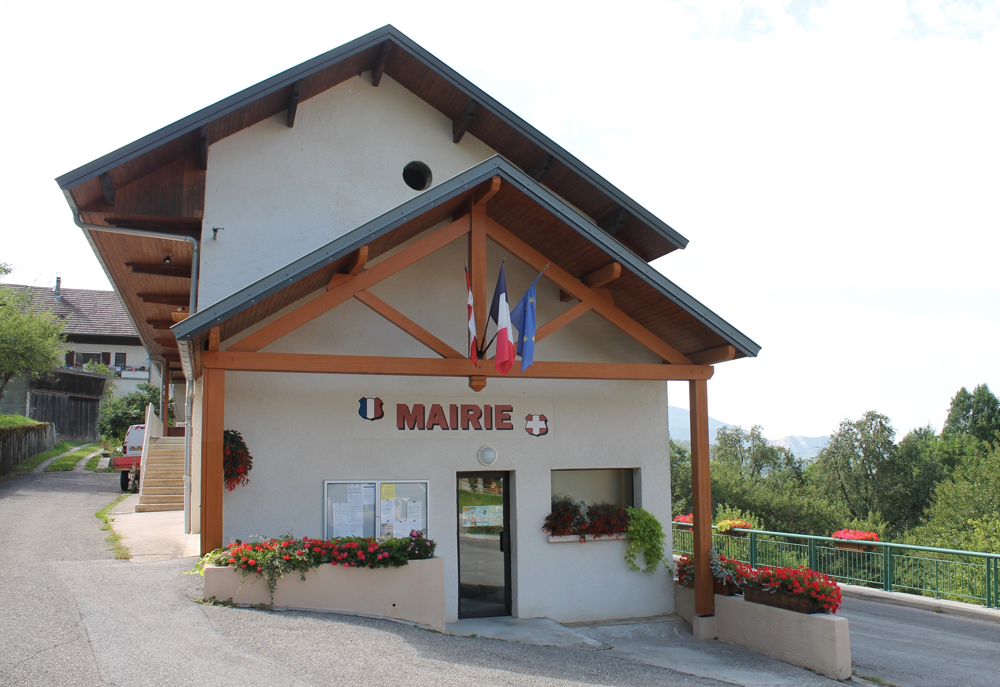 Mairie de la commune française de Giez (Haute-Savoie).